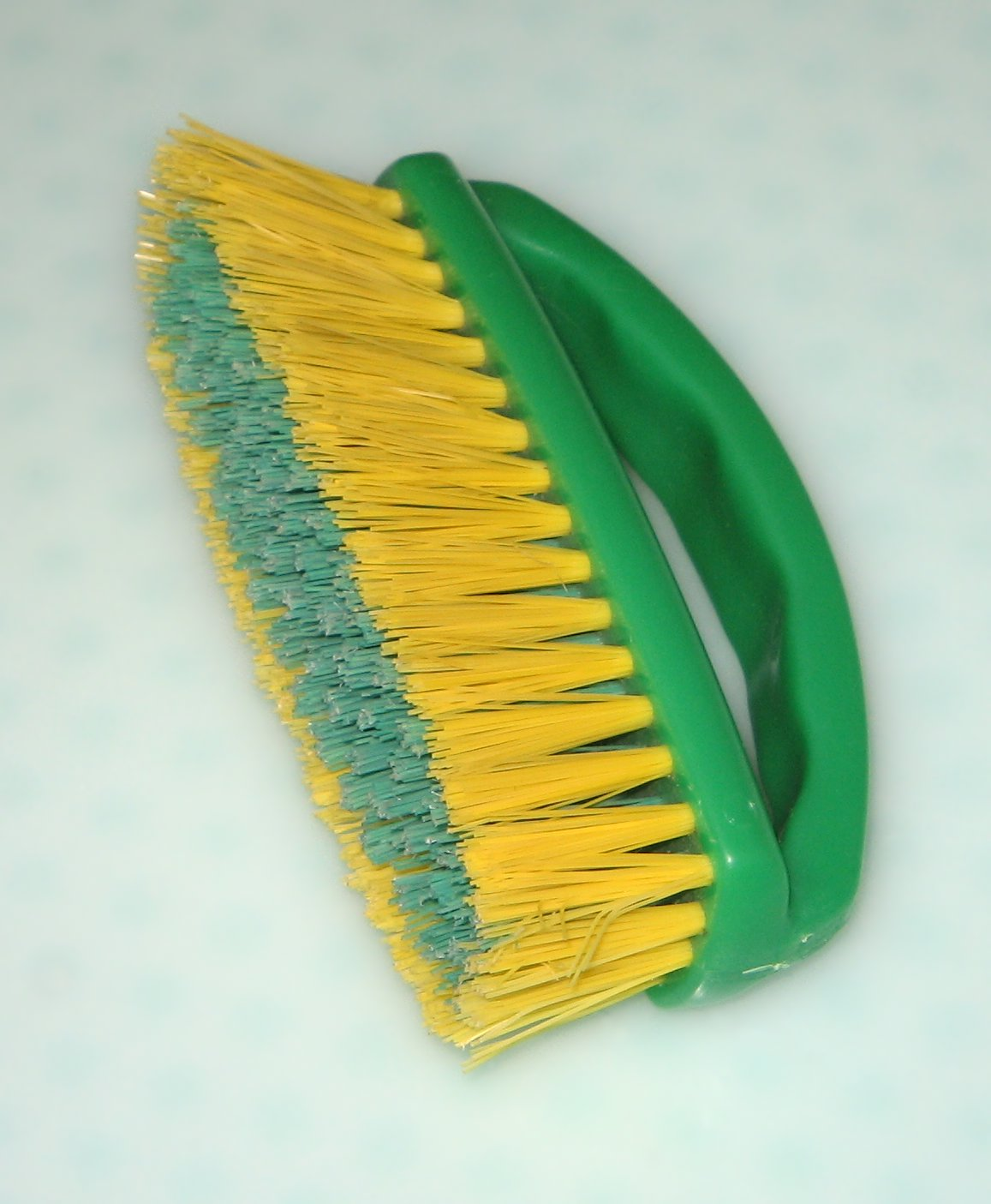 Broso por purigi vestajxojn. Mi, auxtoro de la bildo, permesas al cxiuj uzi gxin kun cxi tiuj kondicxoj: GFDL La fonta bildo de cxi tiu bildo estas ankaux en mia propra retpagxaro [1]